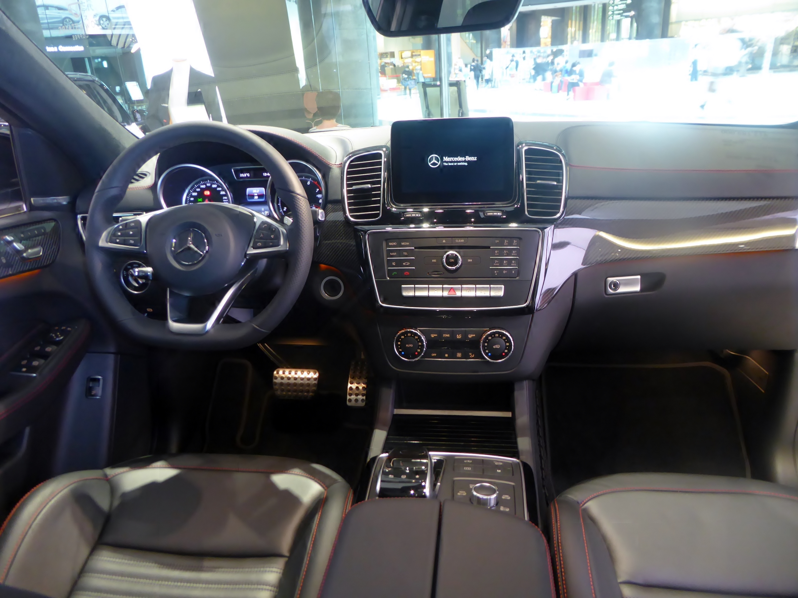 C292型メルセデスAMG・GLE43 4マティッククーペのインテリアを撮影。